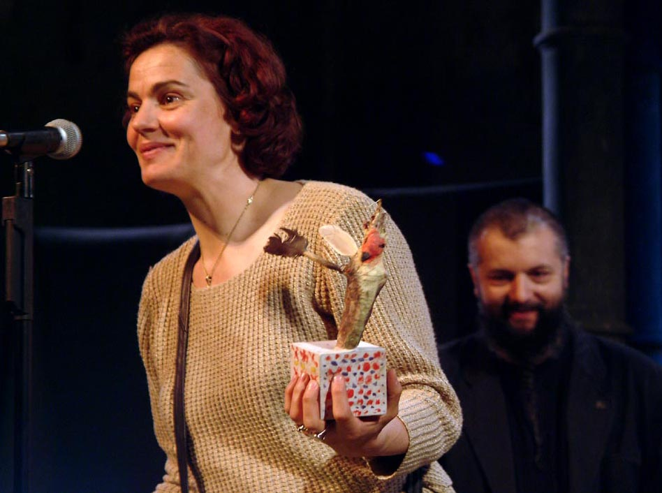 Maia Morgenstern román színésznő a 2004-es Párhuzamos Kultúráért díjátadáson a díjjal. Háttérben Hartyándi Jenő, a MEDIAWAVE Alapítvány vezetője